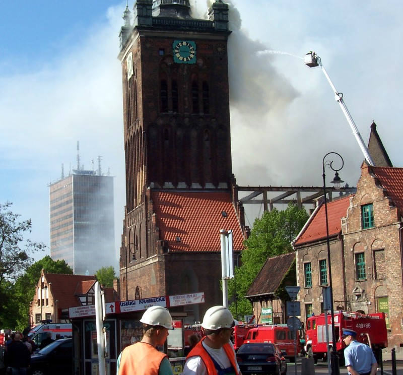 Pożar kościoła św. Katarzyny. Widoczne są ruiny dachu i płonąca wieża.